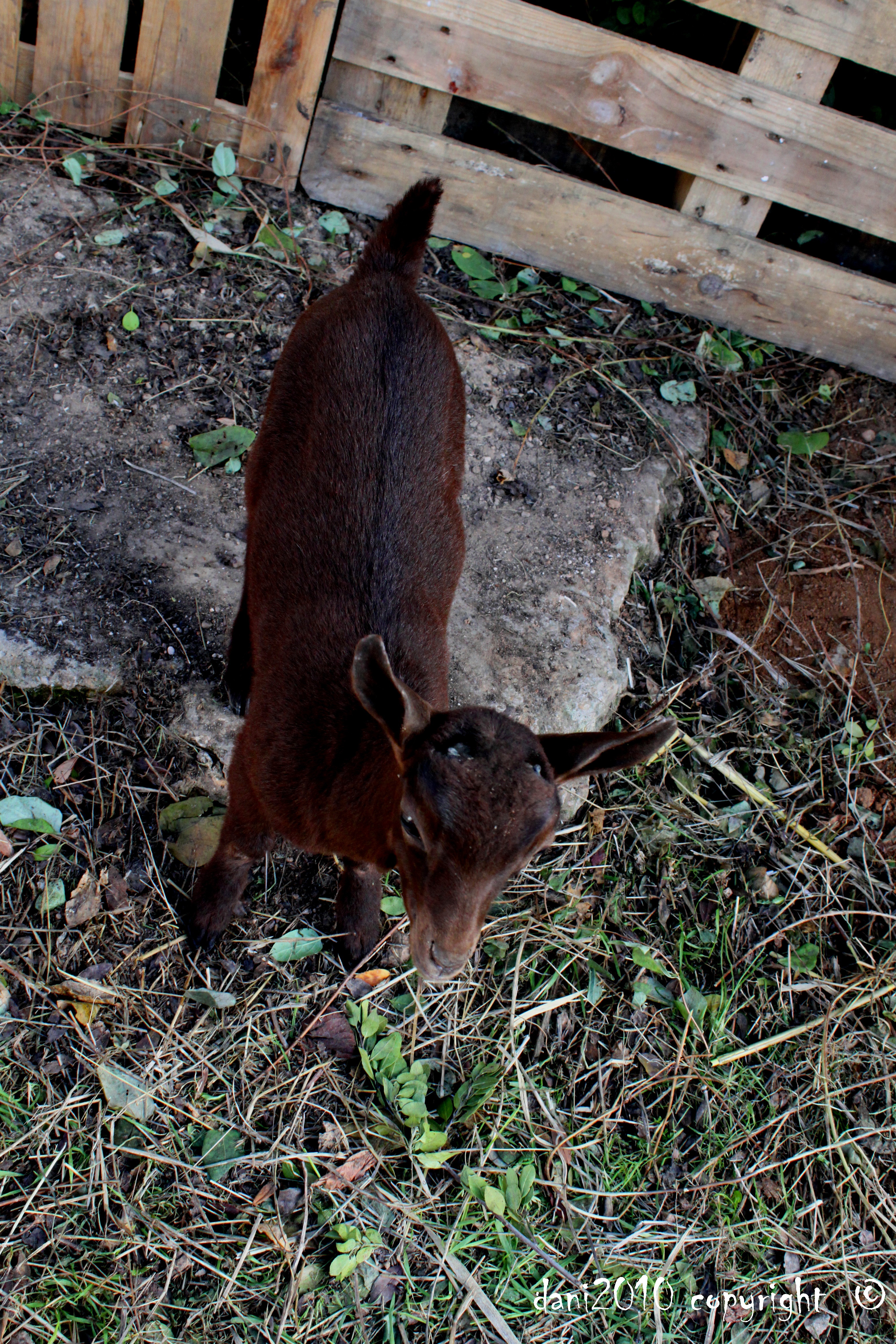 Cabra murciano-granadina de dos meses de edad